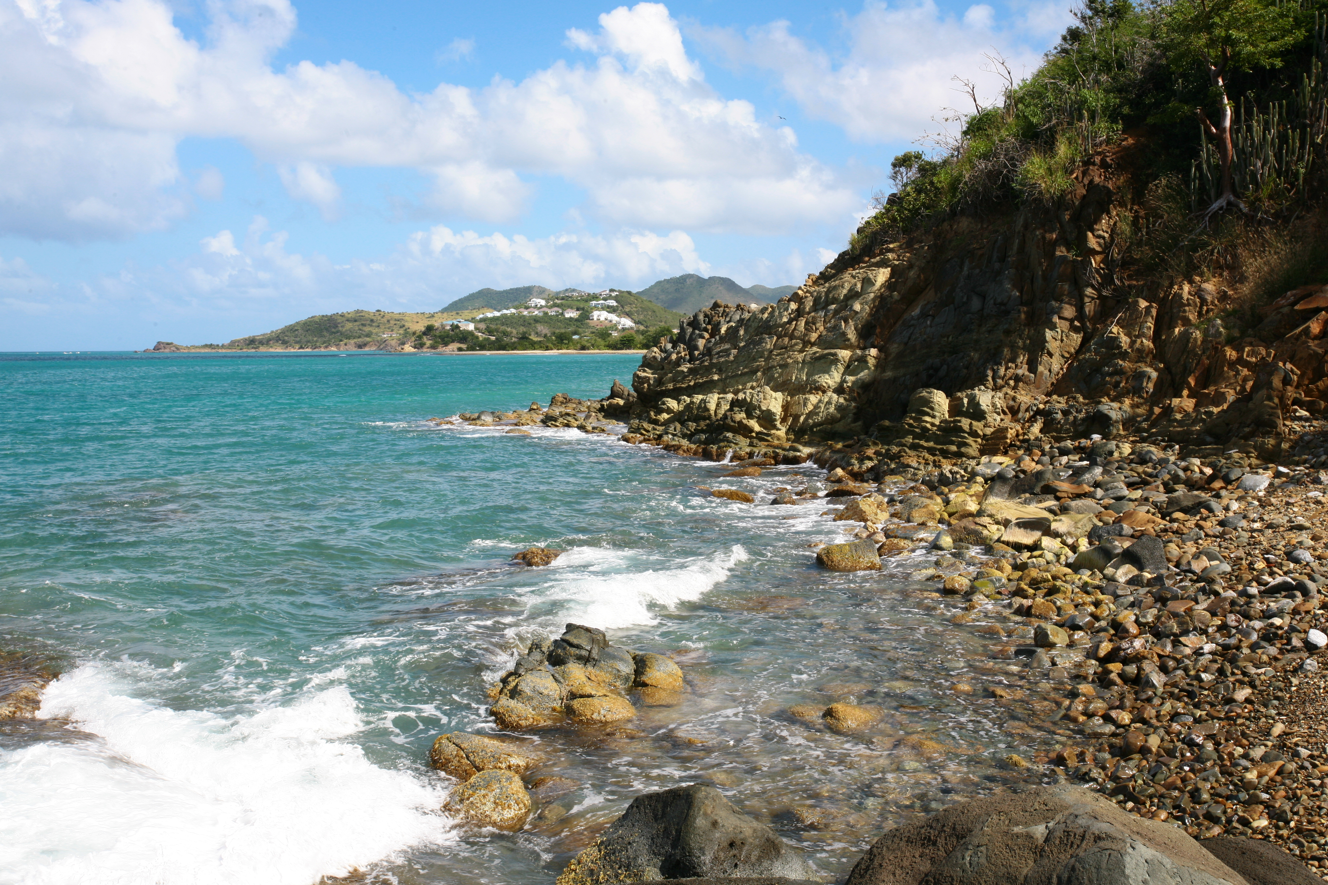 Cote de Saint-Martin face à Anguilla